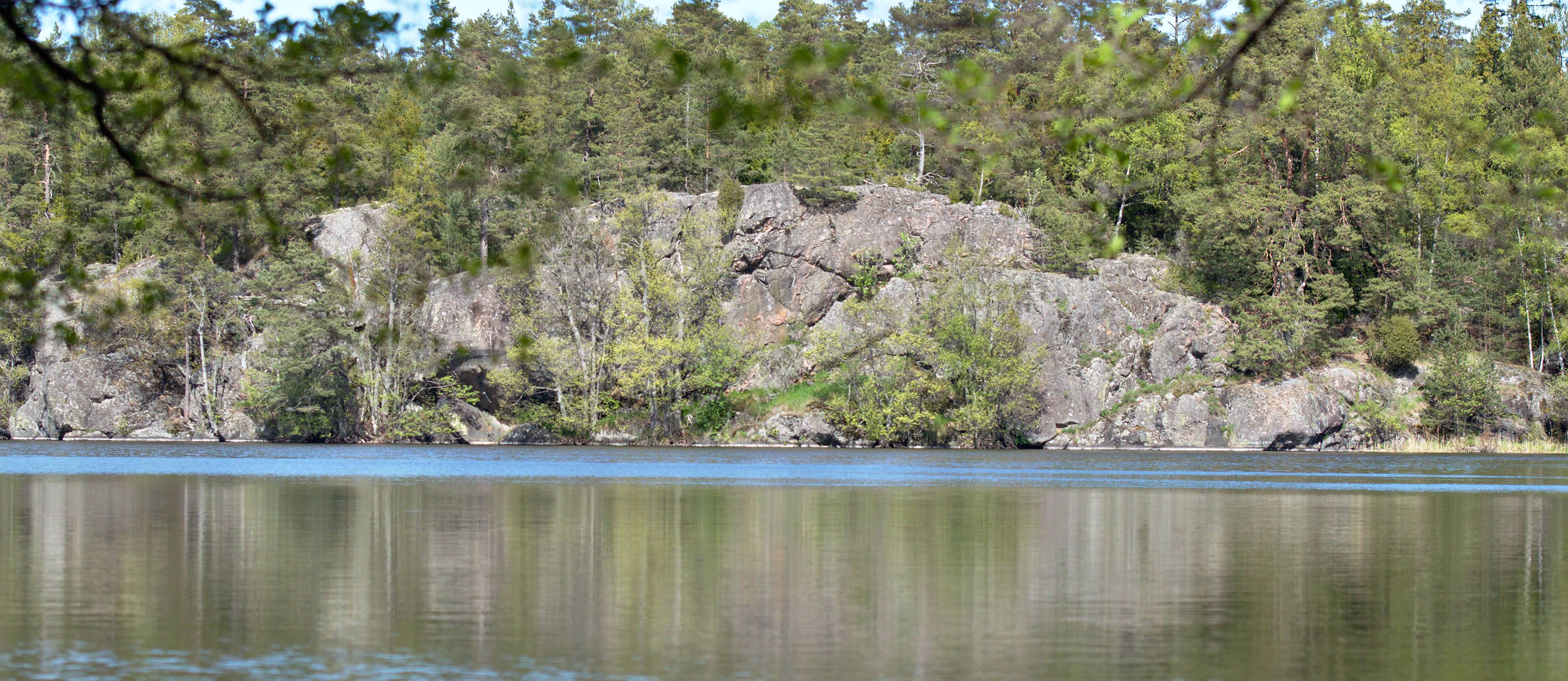 Sjön Bastumaren på Ornö i Haninge kommun. Vy från sydväst.